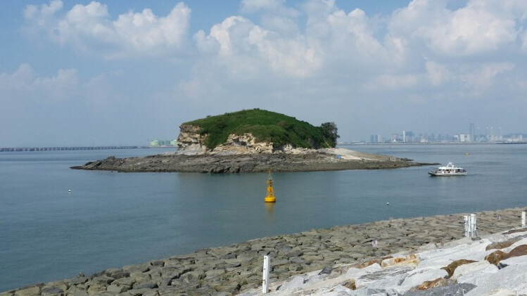 큰가리섬.